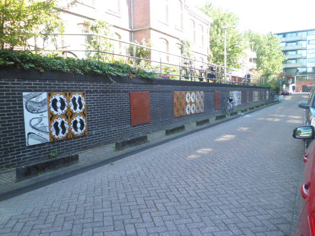 Werk: Oute Waal (Keermuur); Kunstenaar: Ingrid Pasmans; Jaar: 1996; Straat: t.o. Oetewalerstraat 26-34; Materiaal: Geëmailleerd staal en zeefdruk